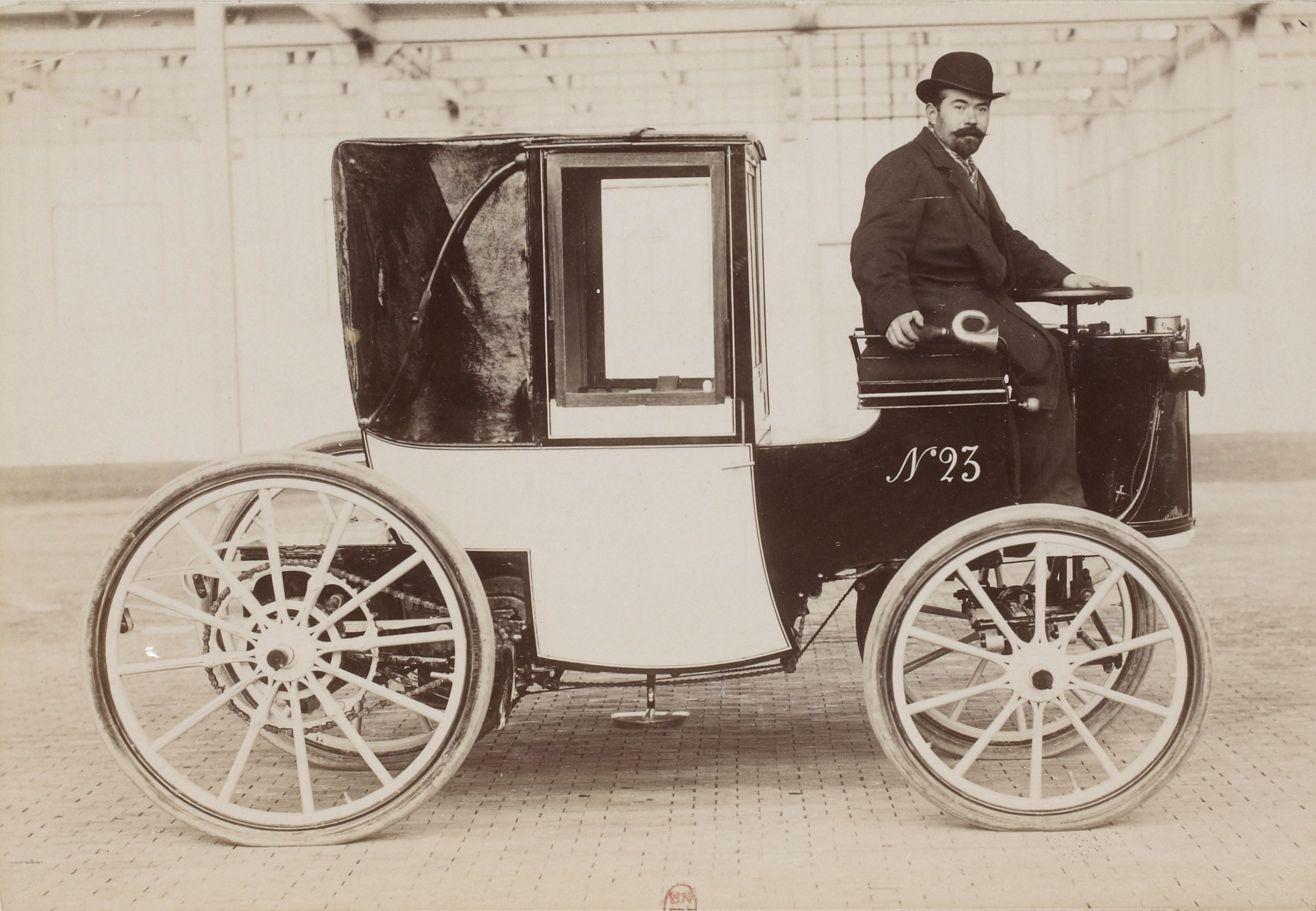 Zweisitziger elektischer Jeantaud Milord, 1898.